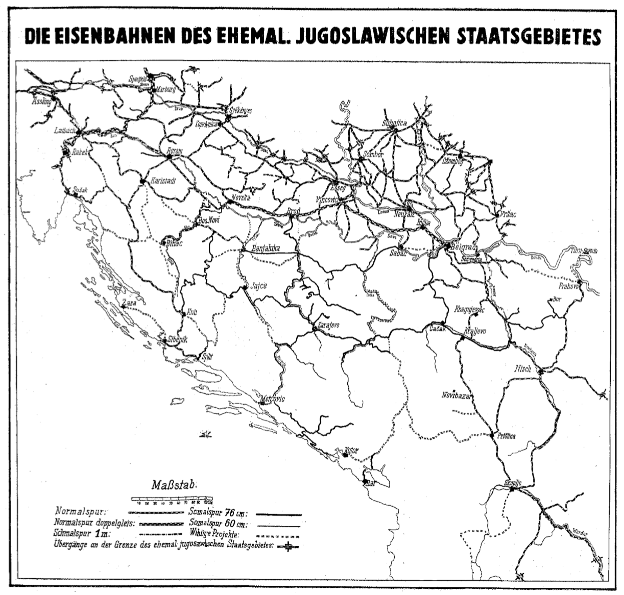 Eisenbahnnetz Jugoslawien 1941